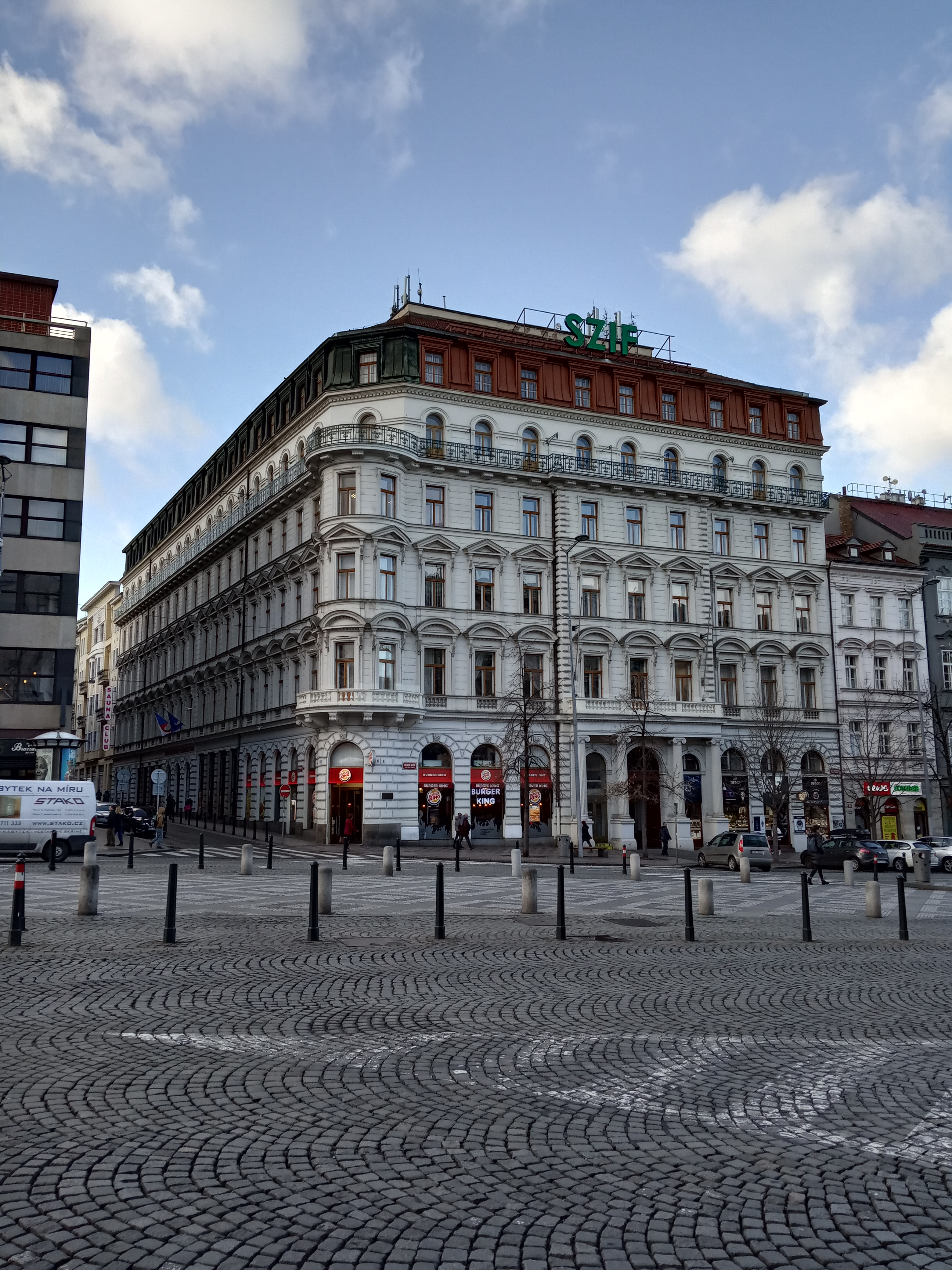 Praha - Nové Město, Václavské náměstí 52, SZIF